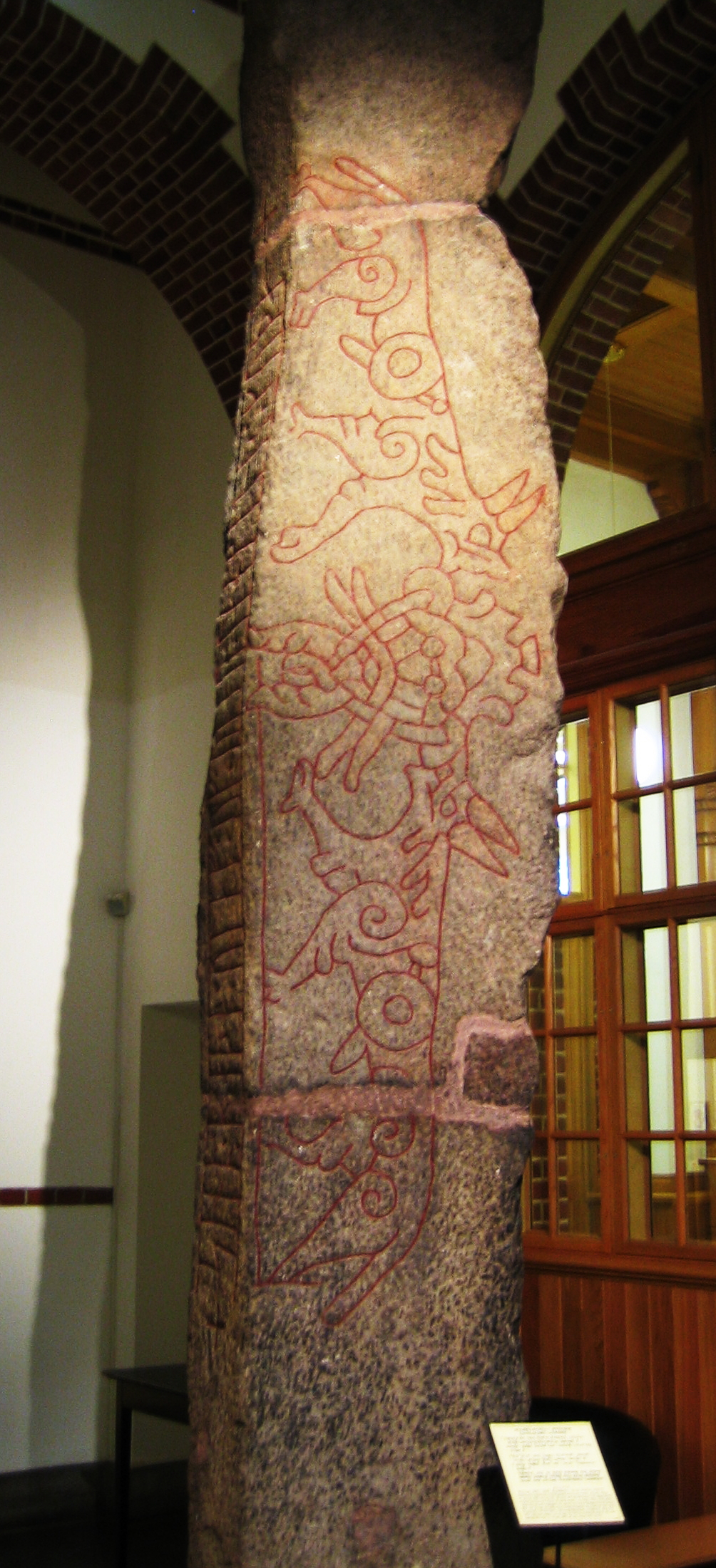 Allhelgonastenen, i Lunds Universitetsbibliotek, signum DR 314.